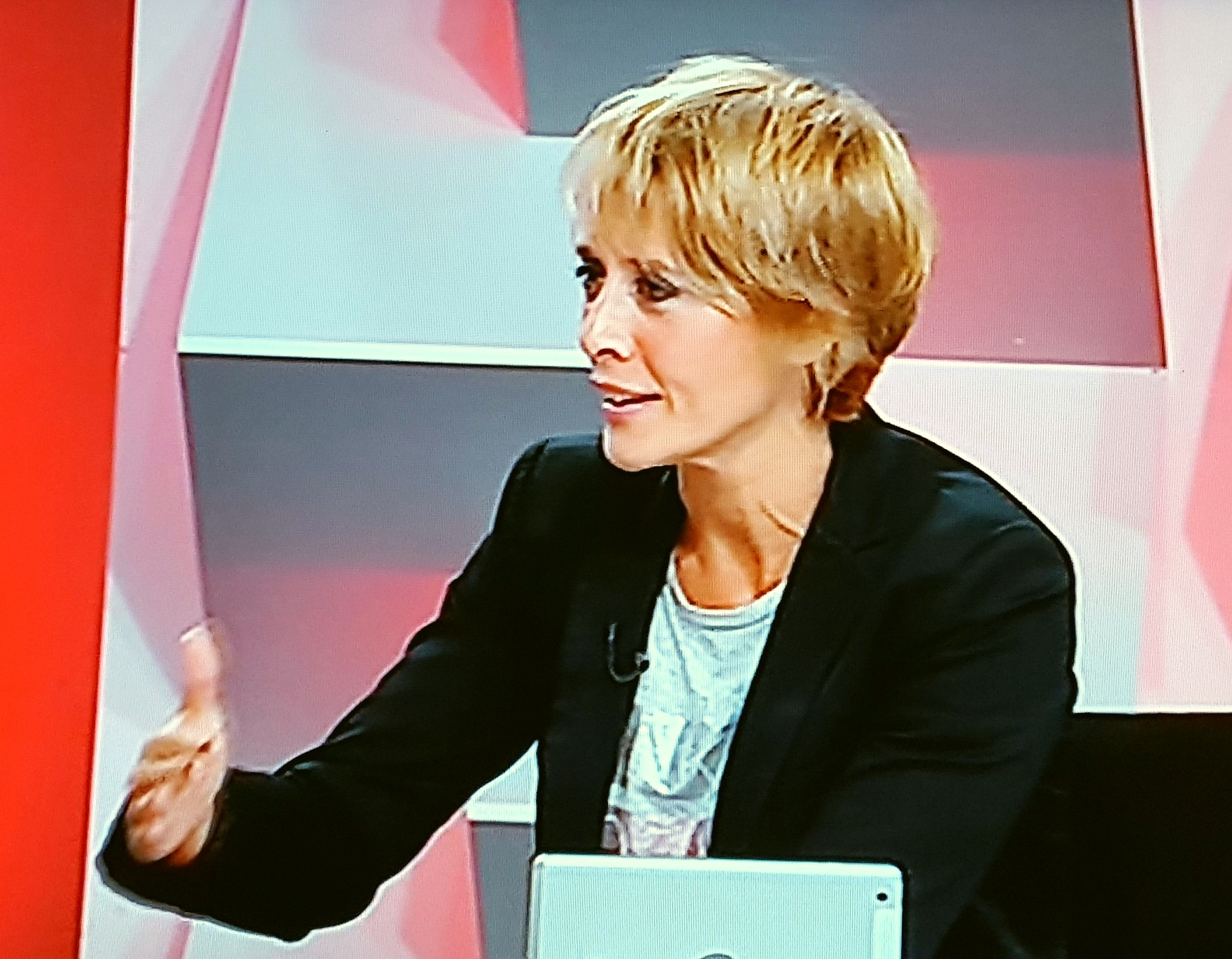 Pilar Kaltzada